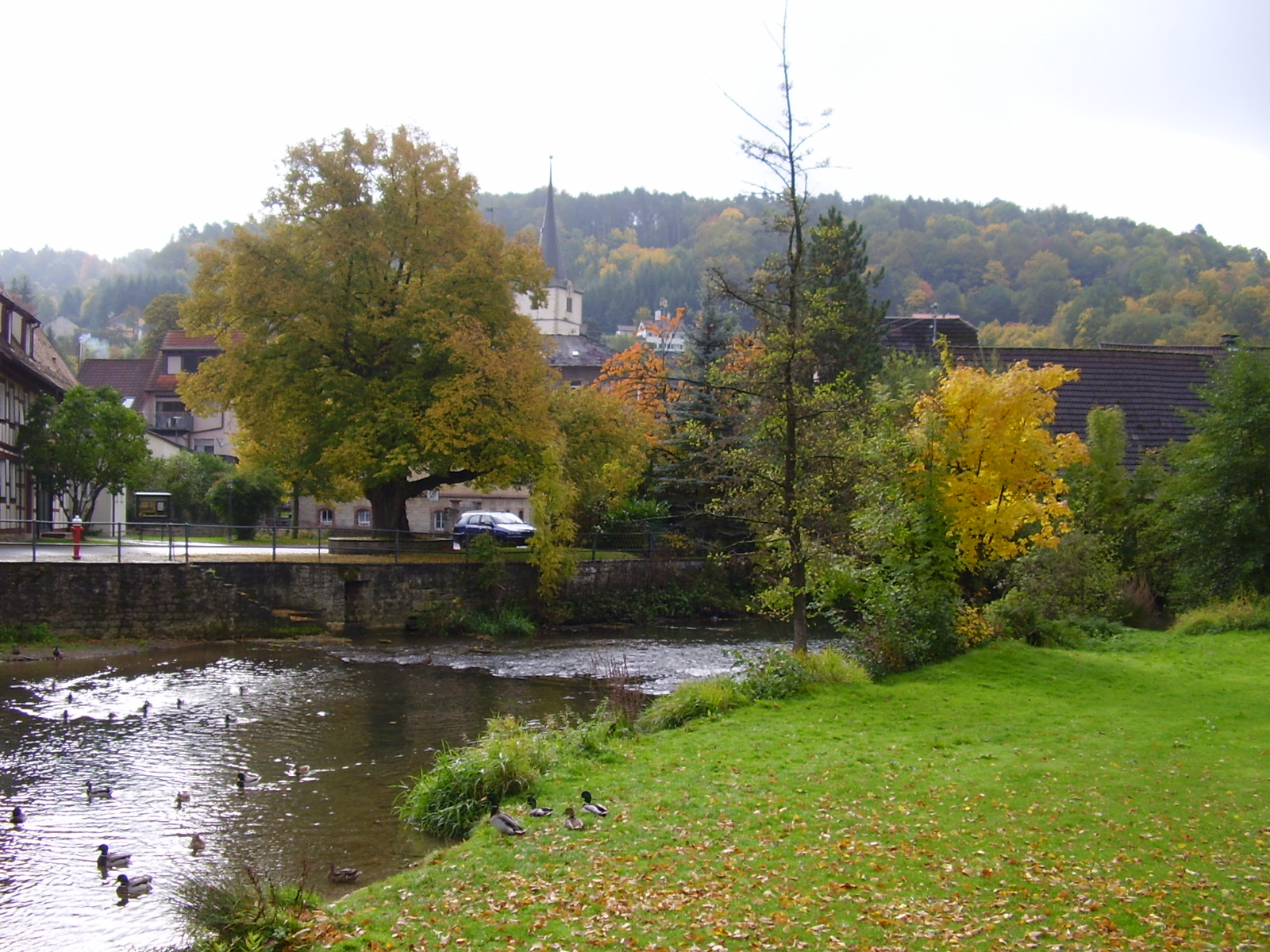 Seckachfluss in Sennfeld